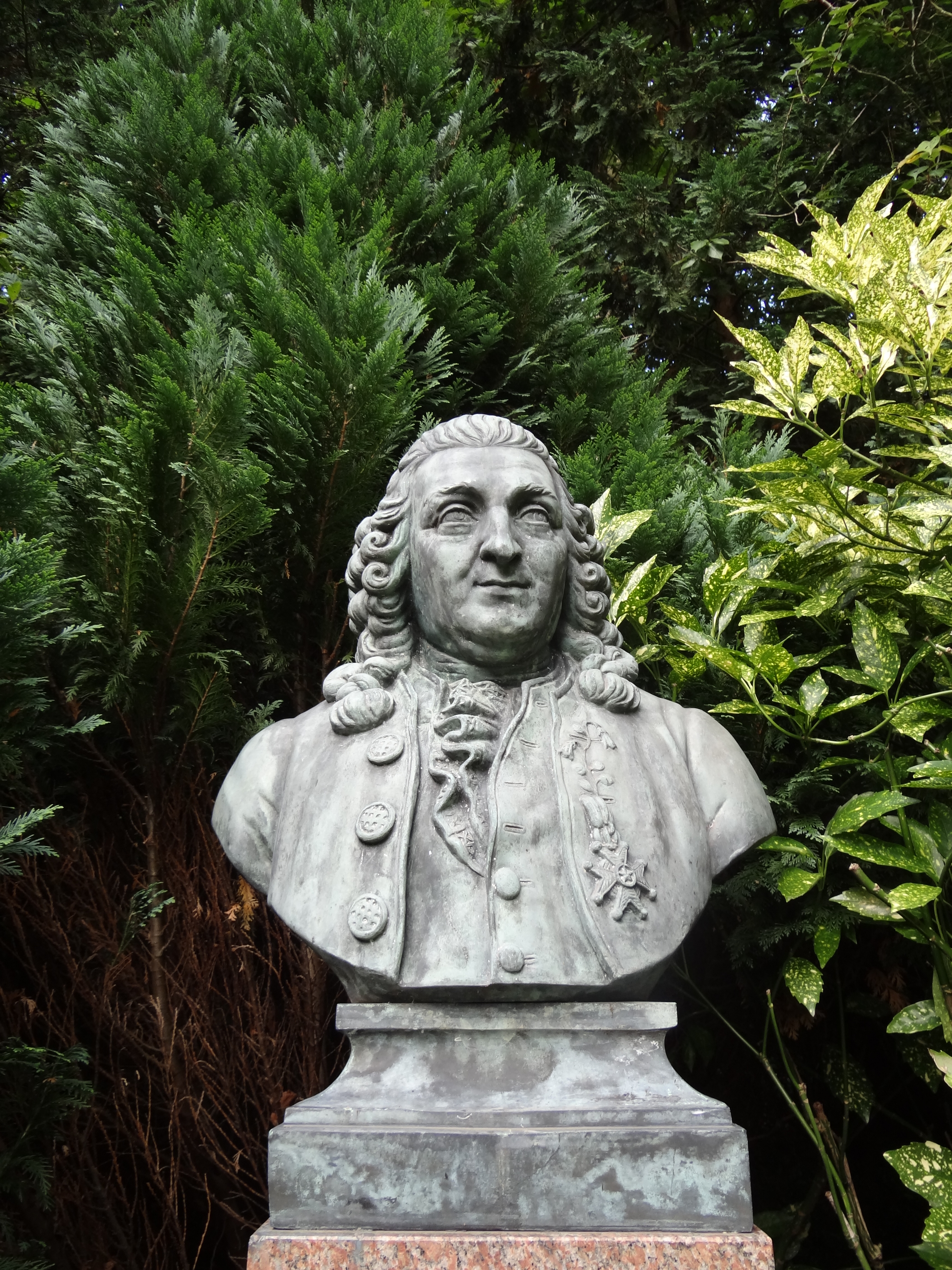 Hartekamp: Borstbeeld van Carolus Linnaeus